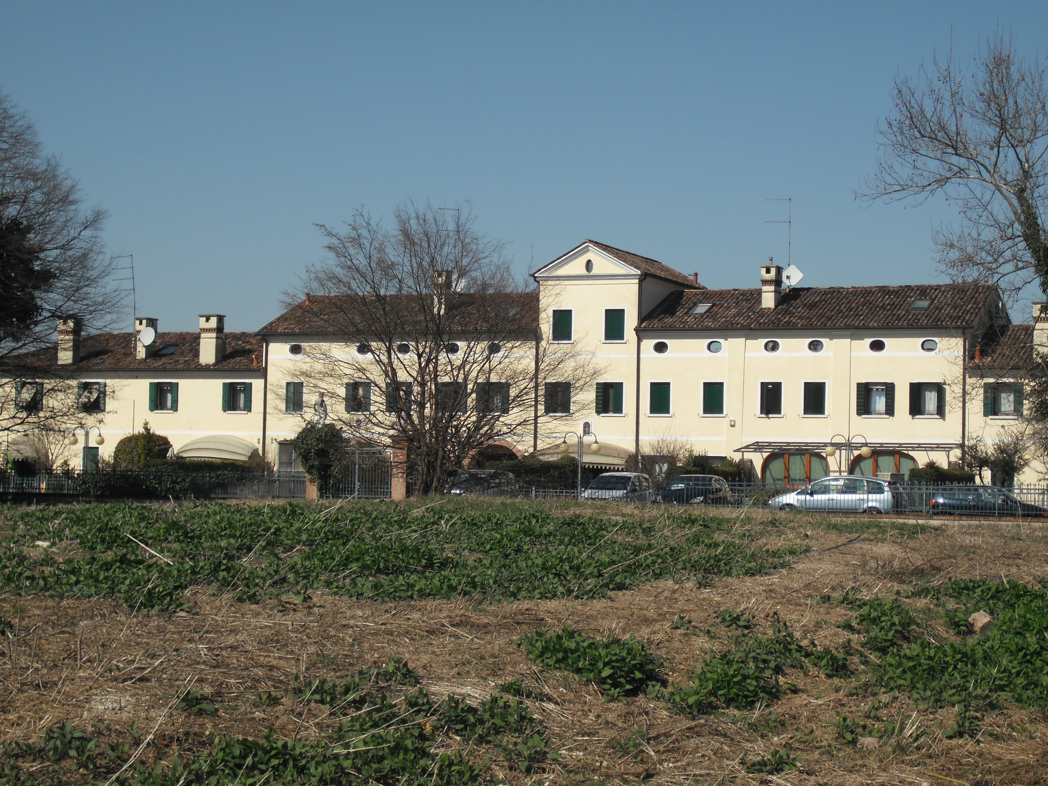 Villa Michieli, Bevilacqua a Mogliano Veneto (XVIII secolo).